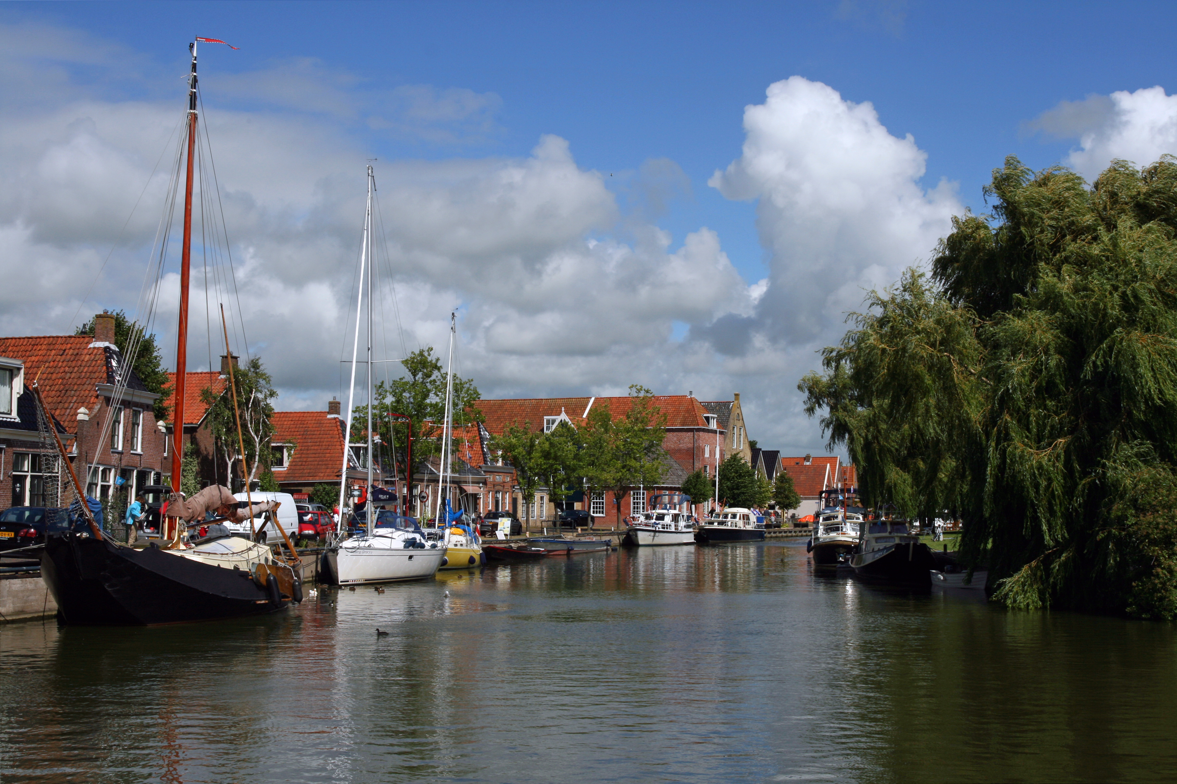 Haven van Makkum in de Nederlandse provincie Friesland.